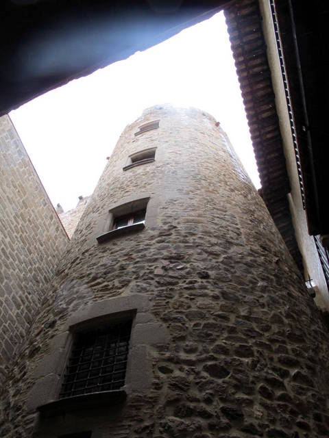 Castell de Vilassar al Maresme - Catalunya